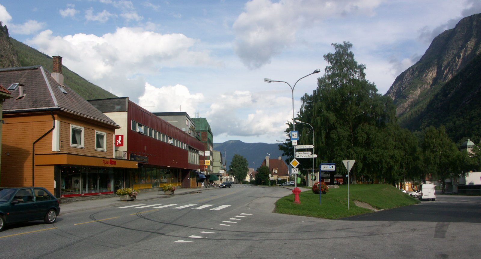 Rjukan centrum, Telemark, Norway